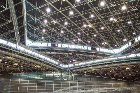 Malla espacial de Feria de Valencia, España